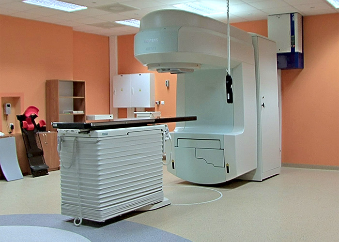 Aparat do radioterapii. Zdjęcie wykonano w Centrum Onkologii Ziemi Lubelskiej.